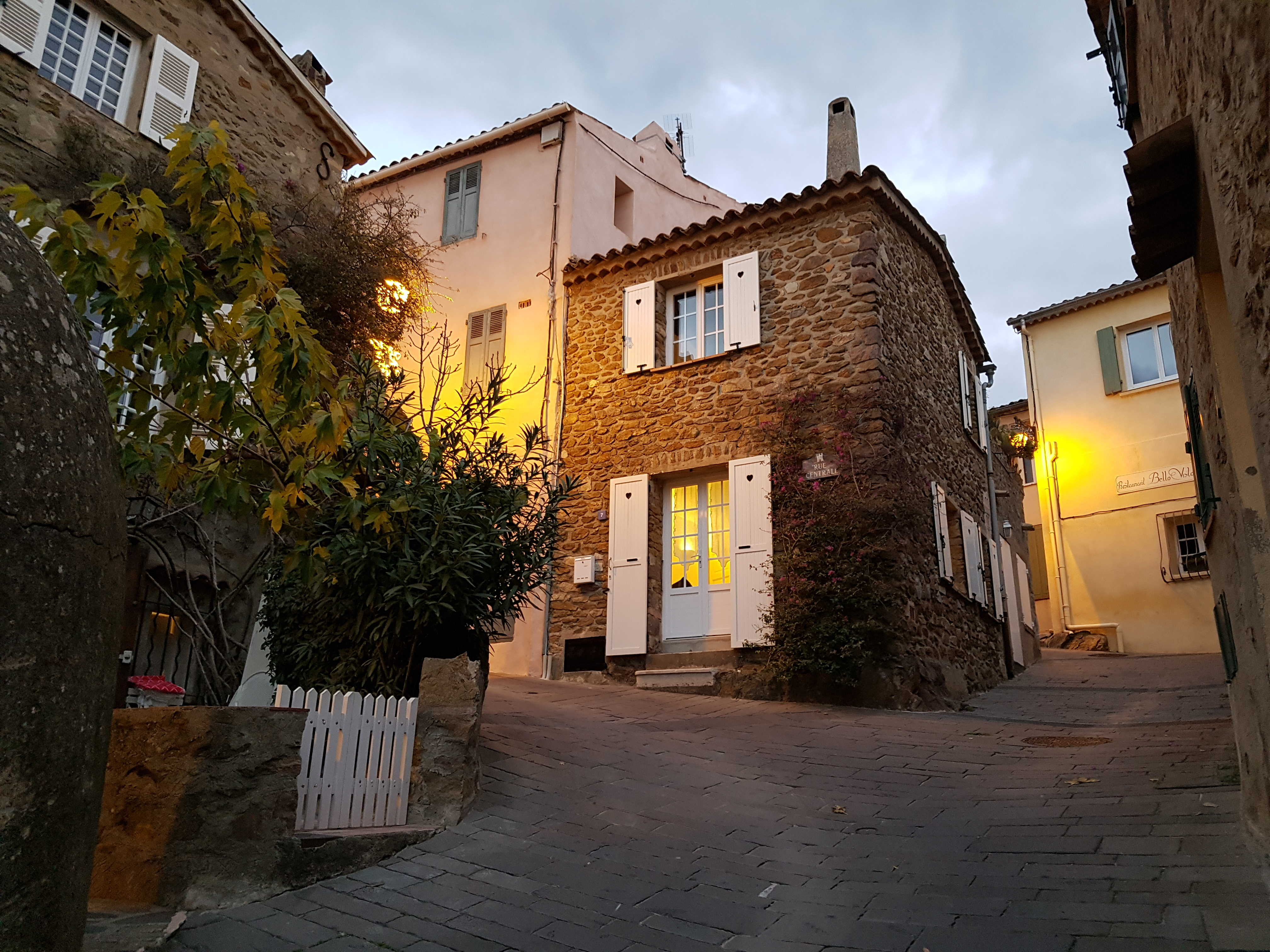 Vue de nuit de l'angle de la rue Centrale et de la rue de la Calade dans le village médiéval de Gassin